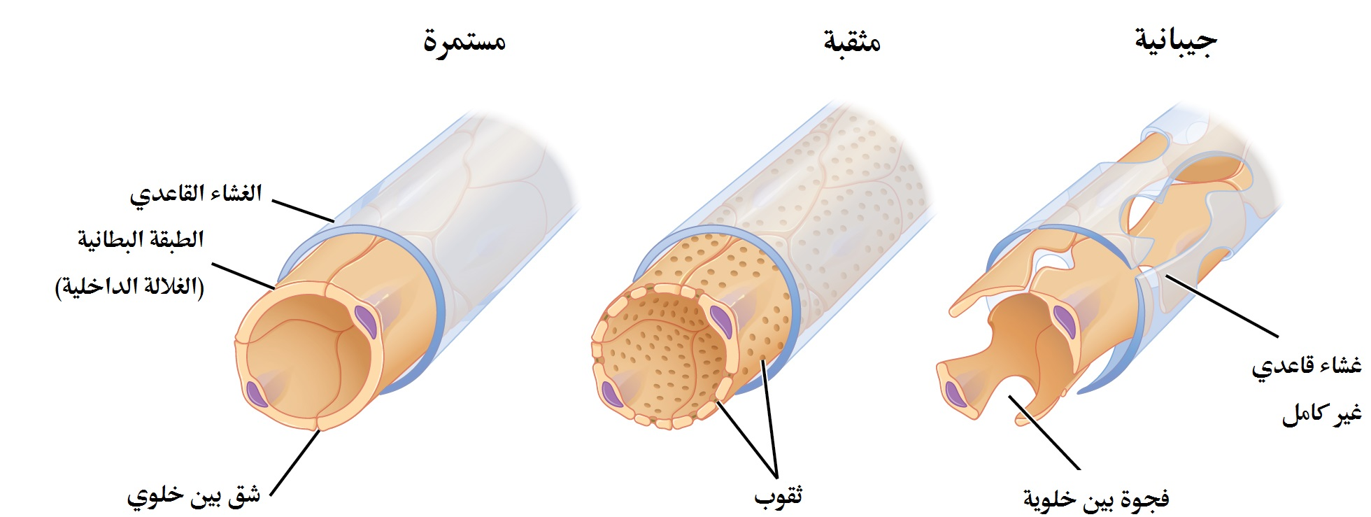 الأنواع الثلاثة الرئيسية للشعيرات الدموية